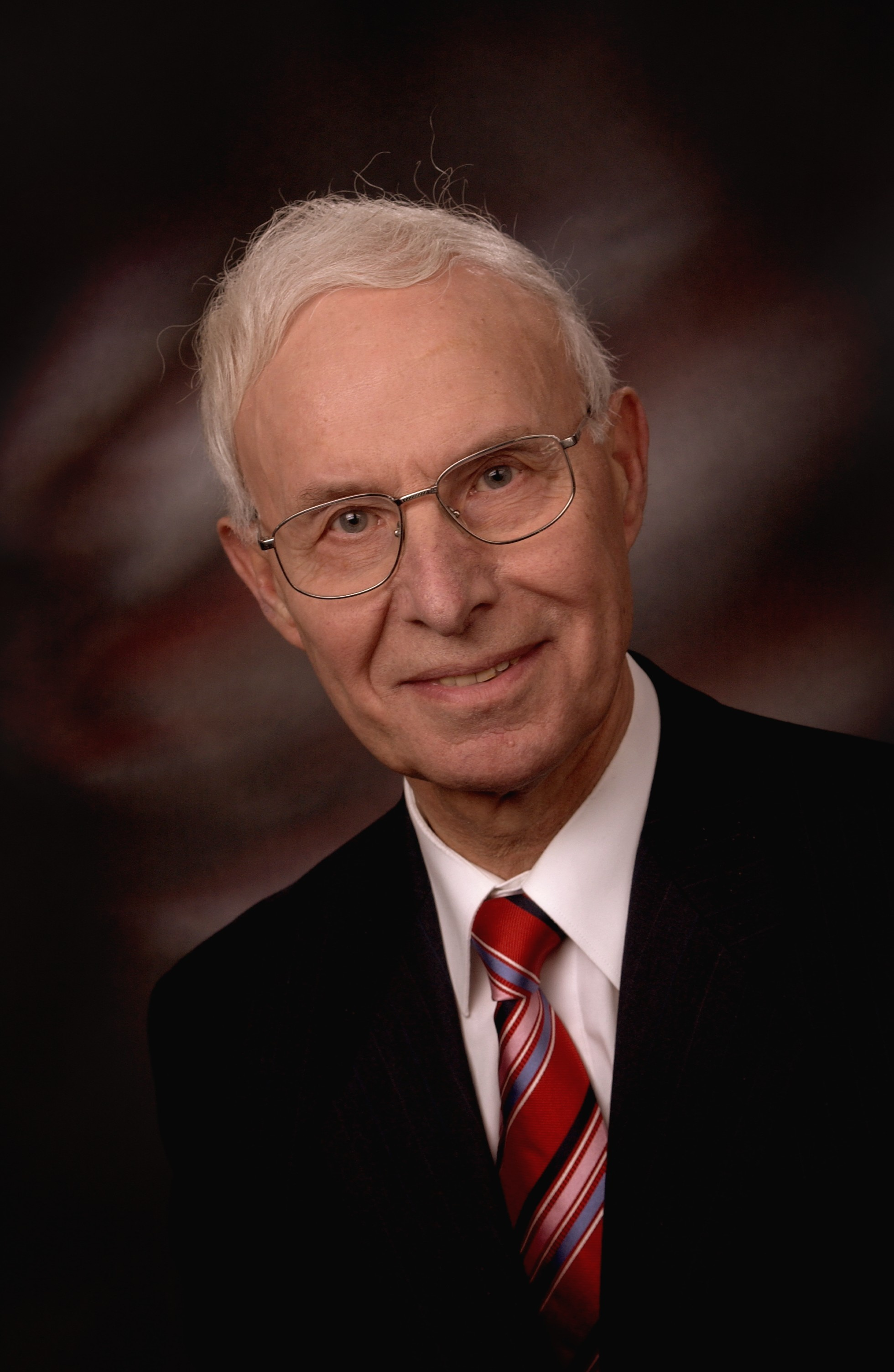 Karl-Heinz Vehring (* 18. Juli 1935 in Klosterholte, Landkreis Emsland) ist ein deutscher Verwaltungsjurist, zuletzt Oberstadtdirektor von Lingen (Ems).